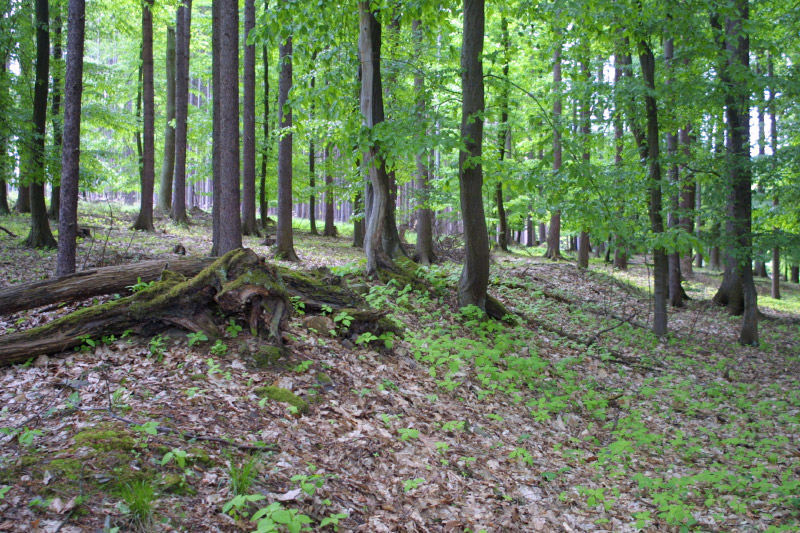 Třebokov, zbytky po kamenné ohradě na jižním okraji areálu.